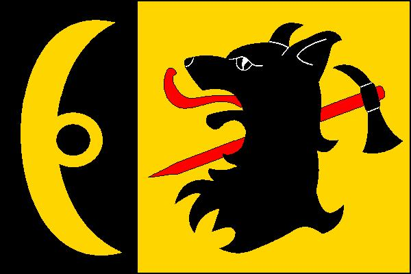 Vlajka obce Chodská Lhota